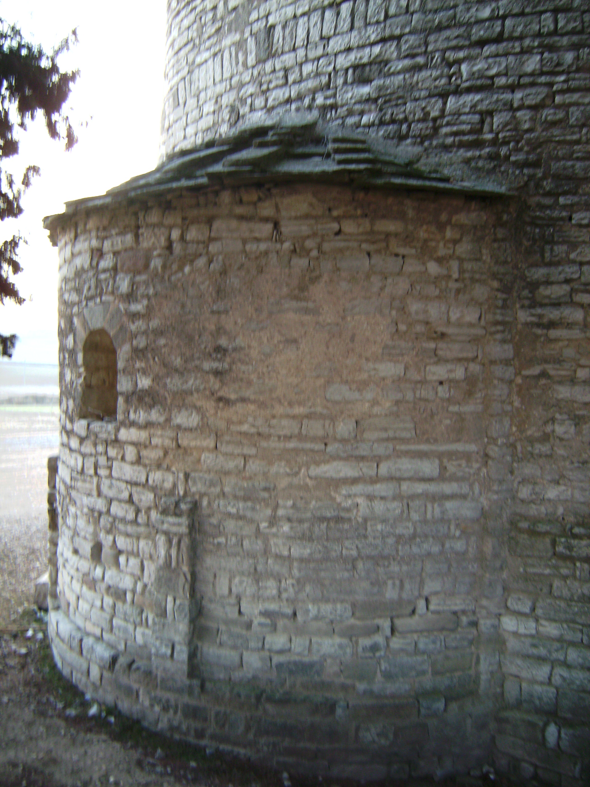 Cervera - Iglesia de Sant Pere El Gros (Abside)